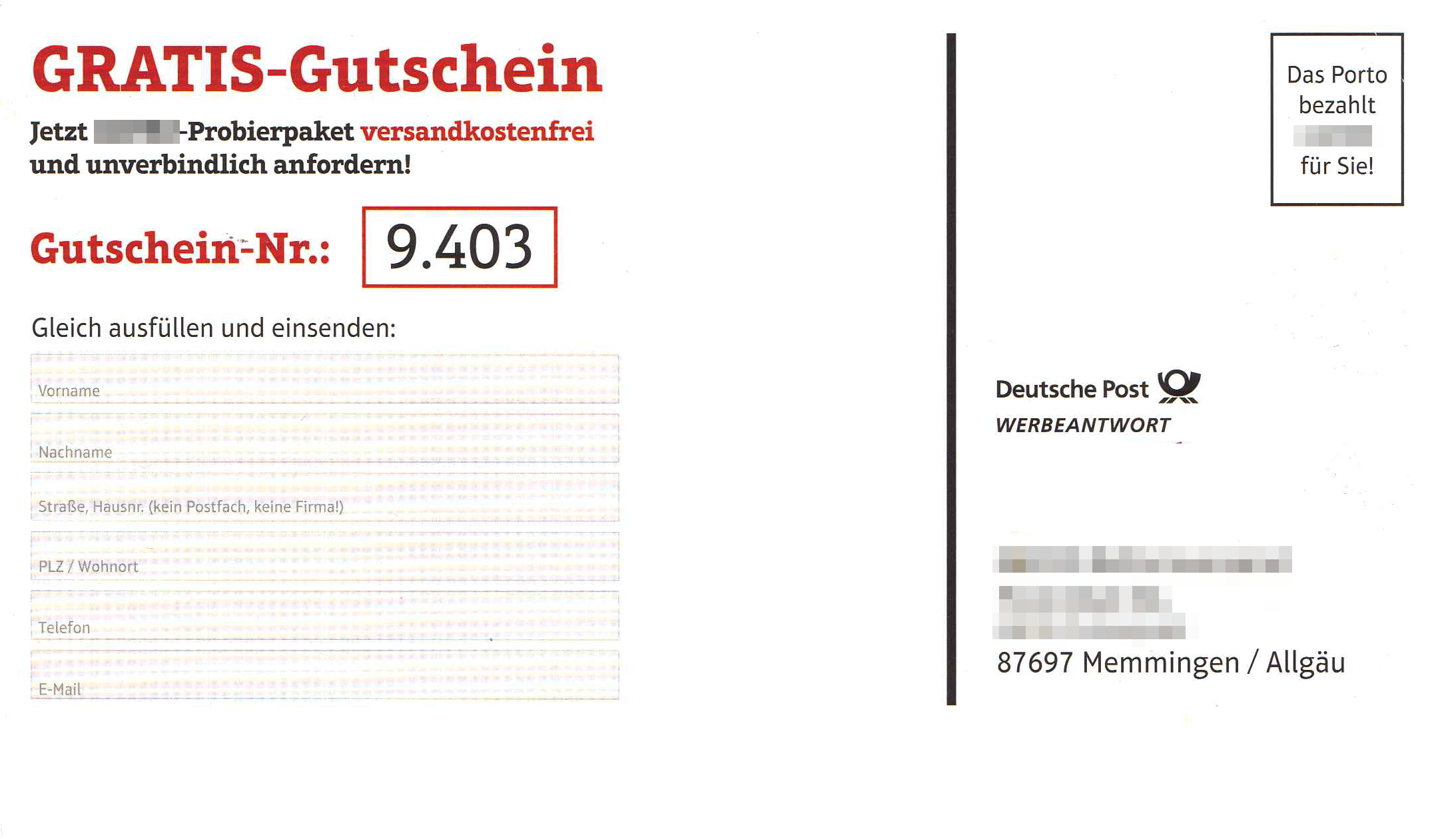 Werbeantwort-Postkarte, der Empfängername wurde anonymisiert